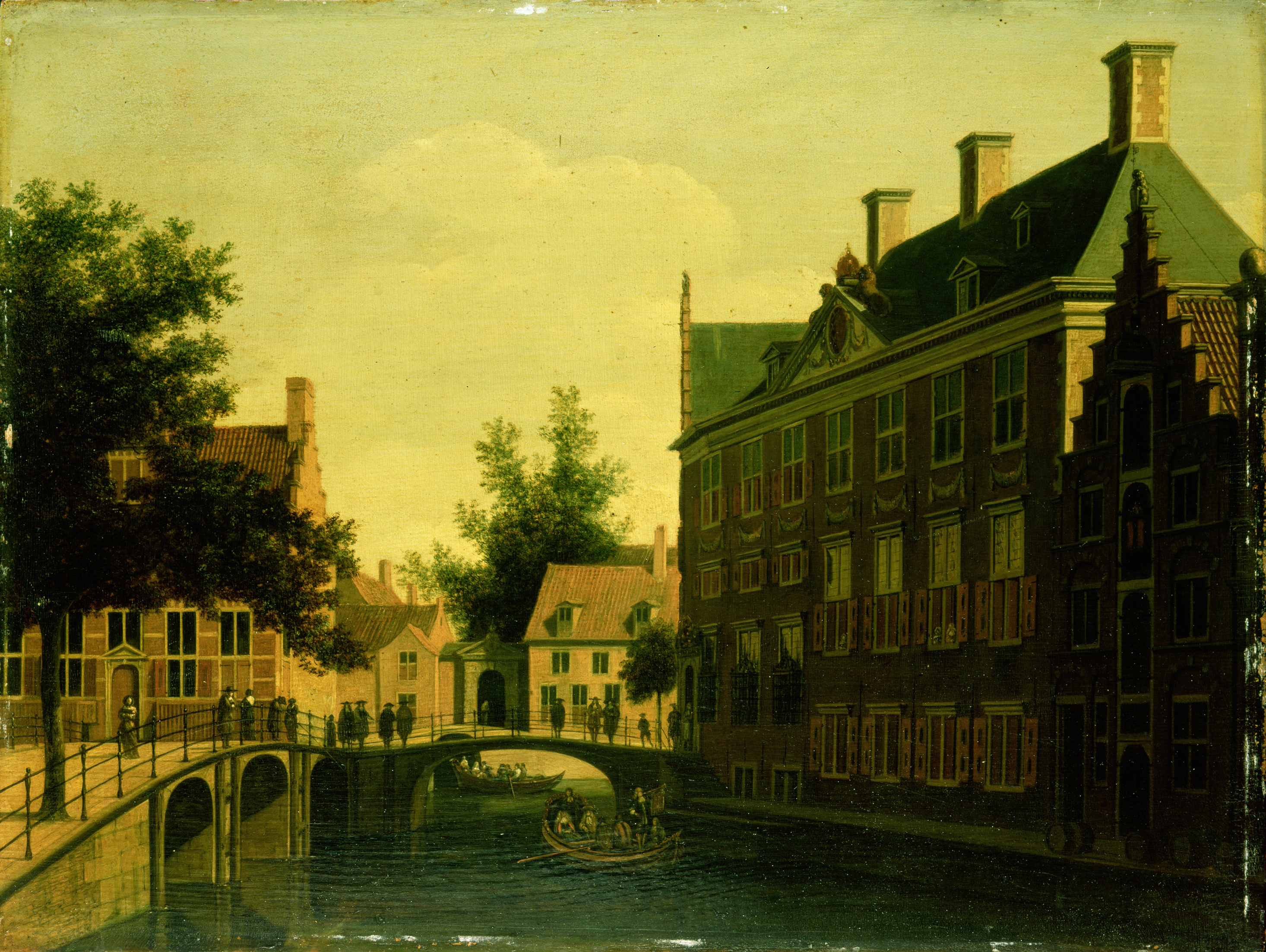 Het Oude Zijds Herenlogement te Amsterdam, links het 'Huis aan de drie Grachten'.